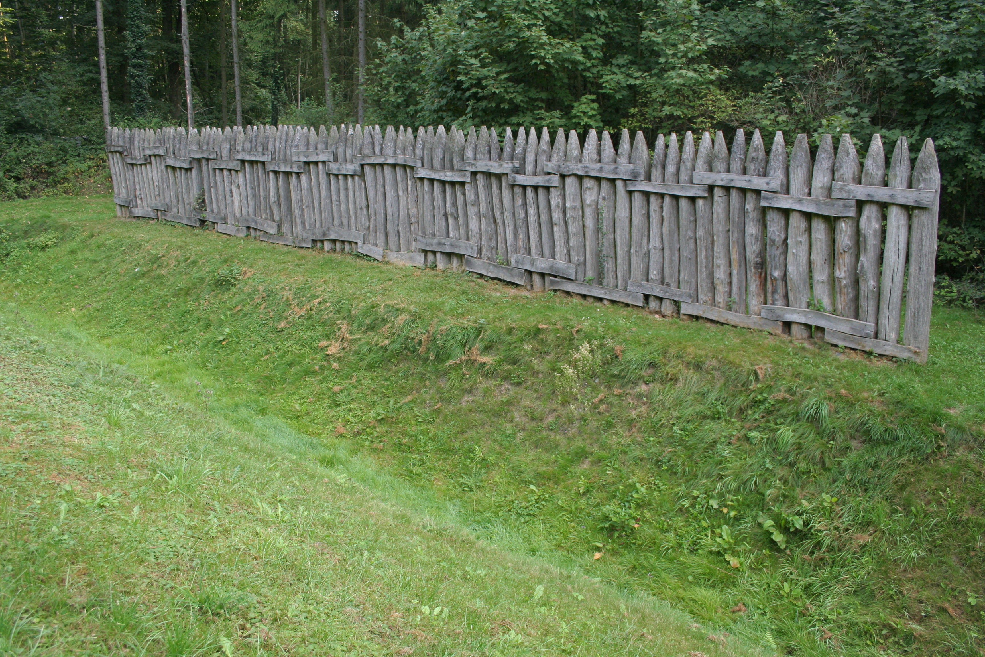 zeigt den Limes in Limeshain